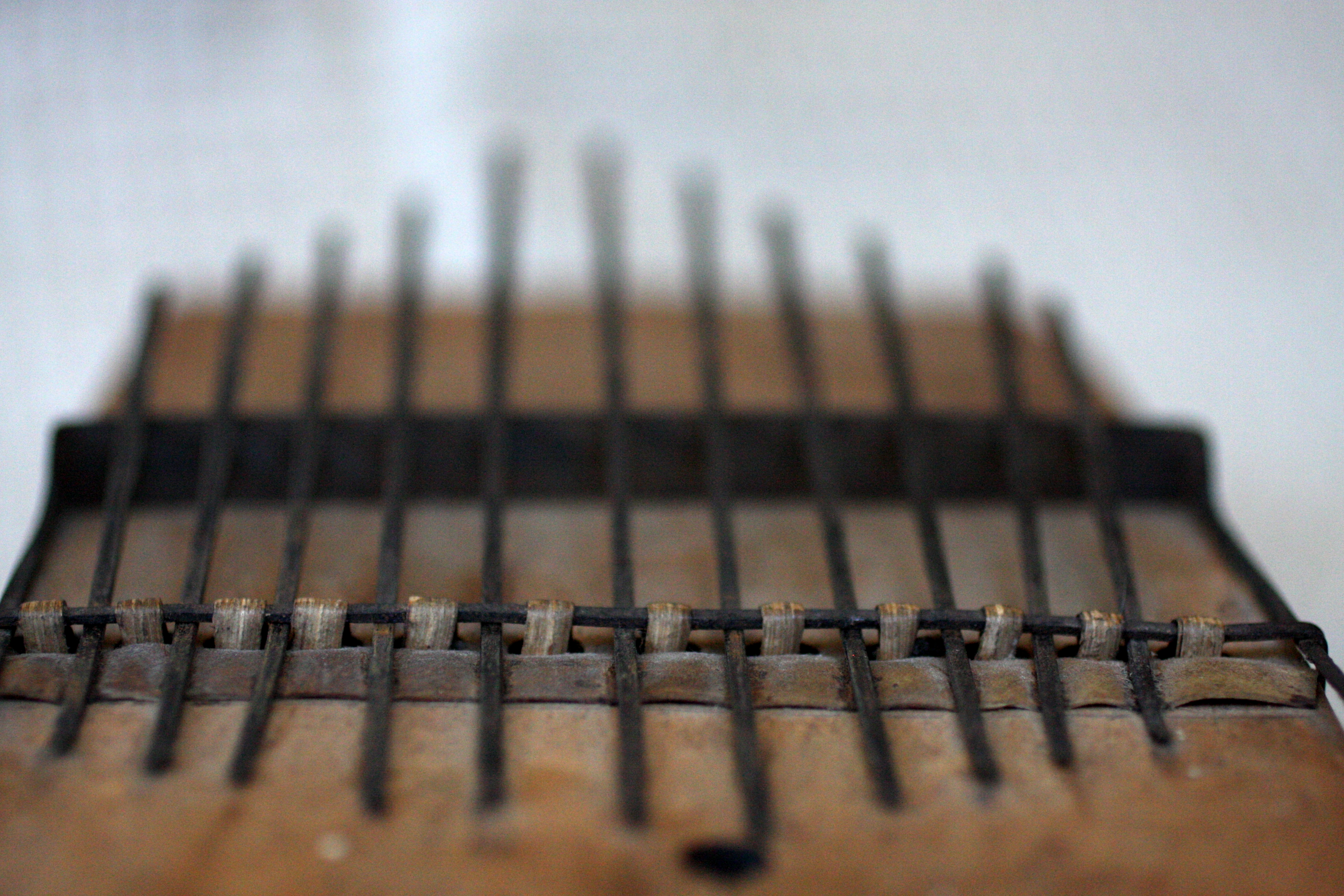 Egy kalimba lamelláinak rögzítése